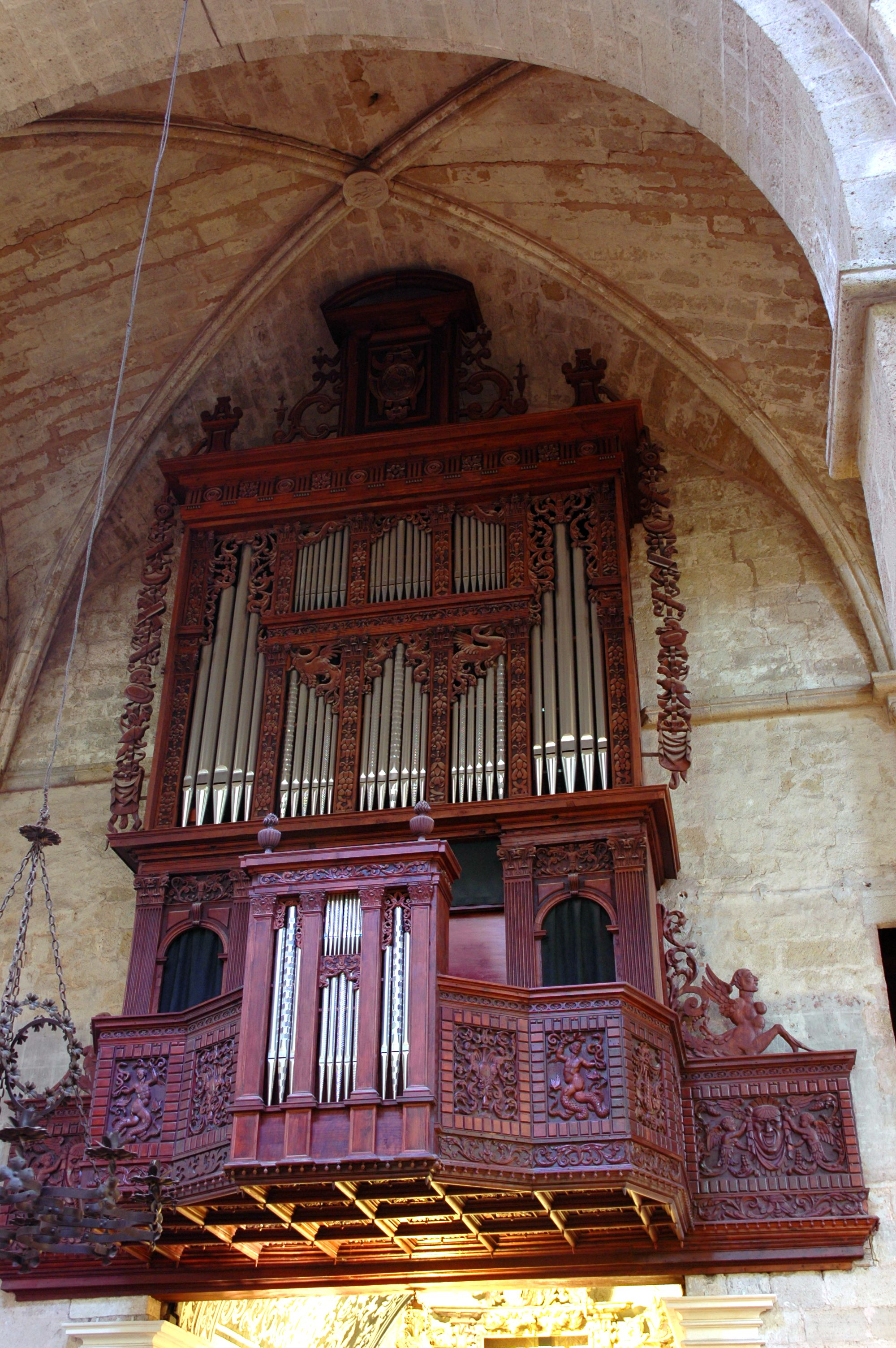 Monestir de Sant Cugat - Orgue